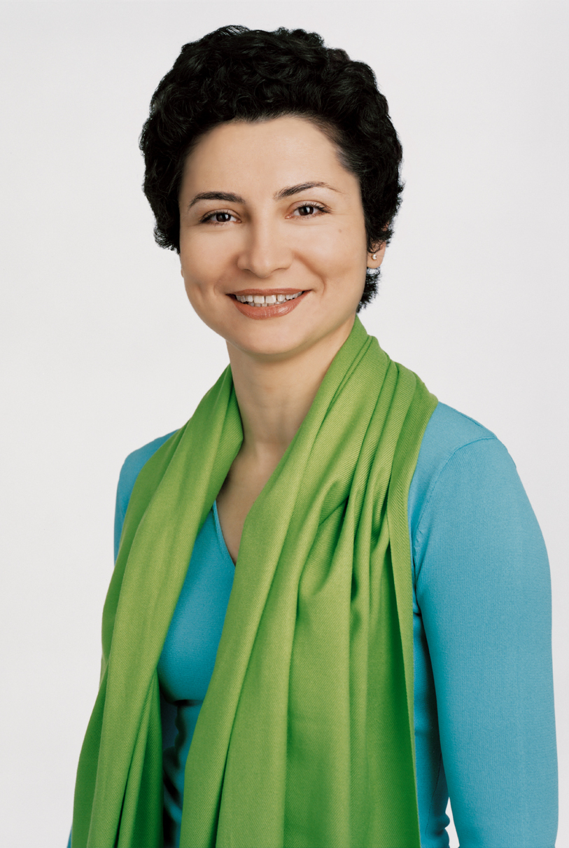 Alev Korun. Wiener Landtagsabgeordnete und Mitglied des Wiener Gemeinderats